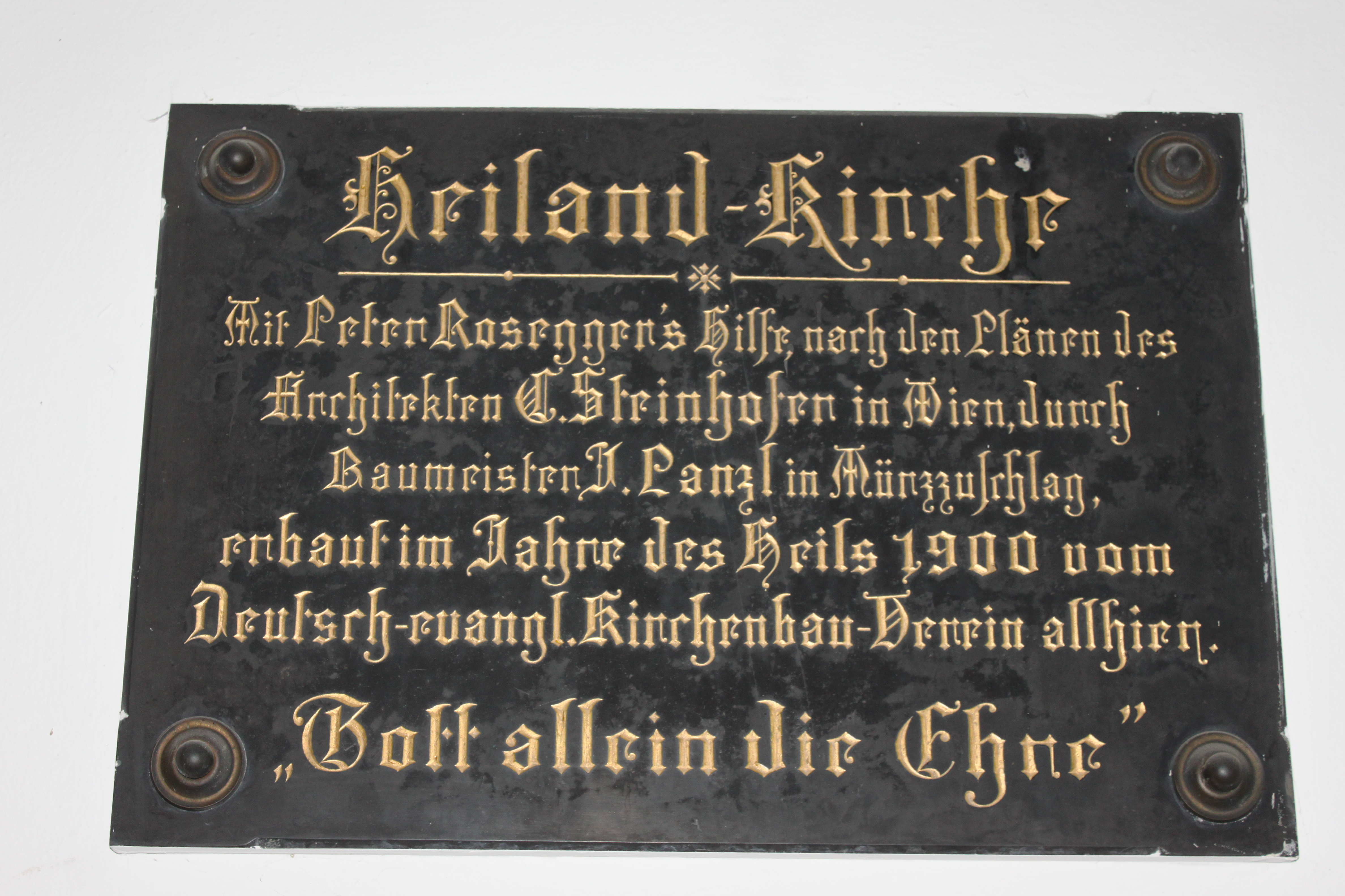 Evang. Pfarrkirche A.B., Heilandskirche, Gedenktafel im Vorraum der Kirche